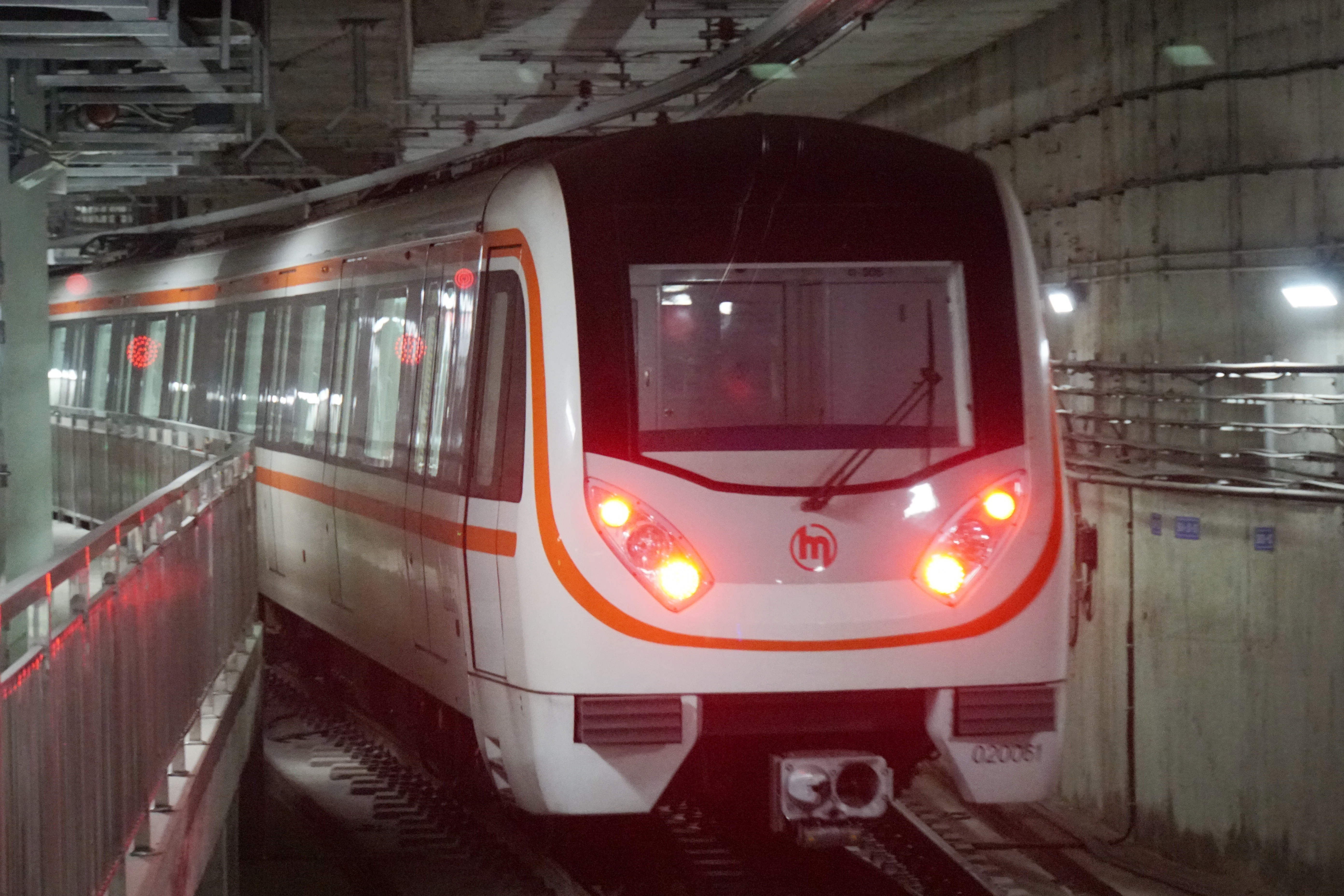 2号线列车在古翠路站折返